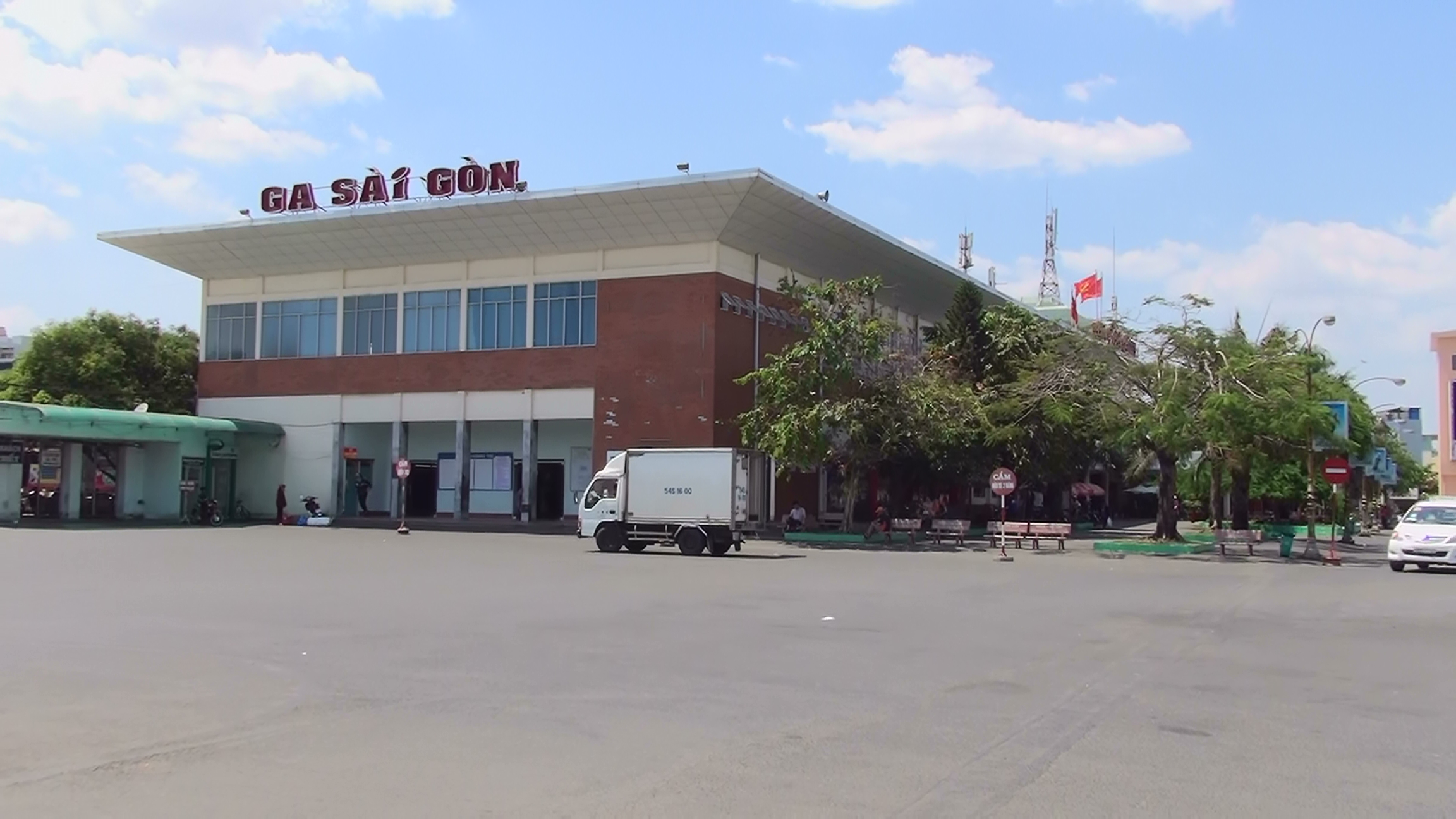 ベトナム南北統一鉄道サイゴン駅舎